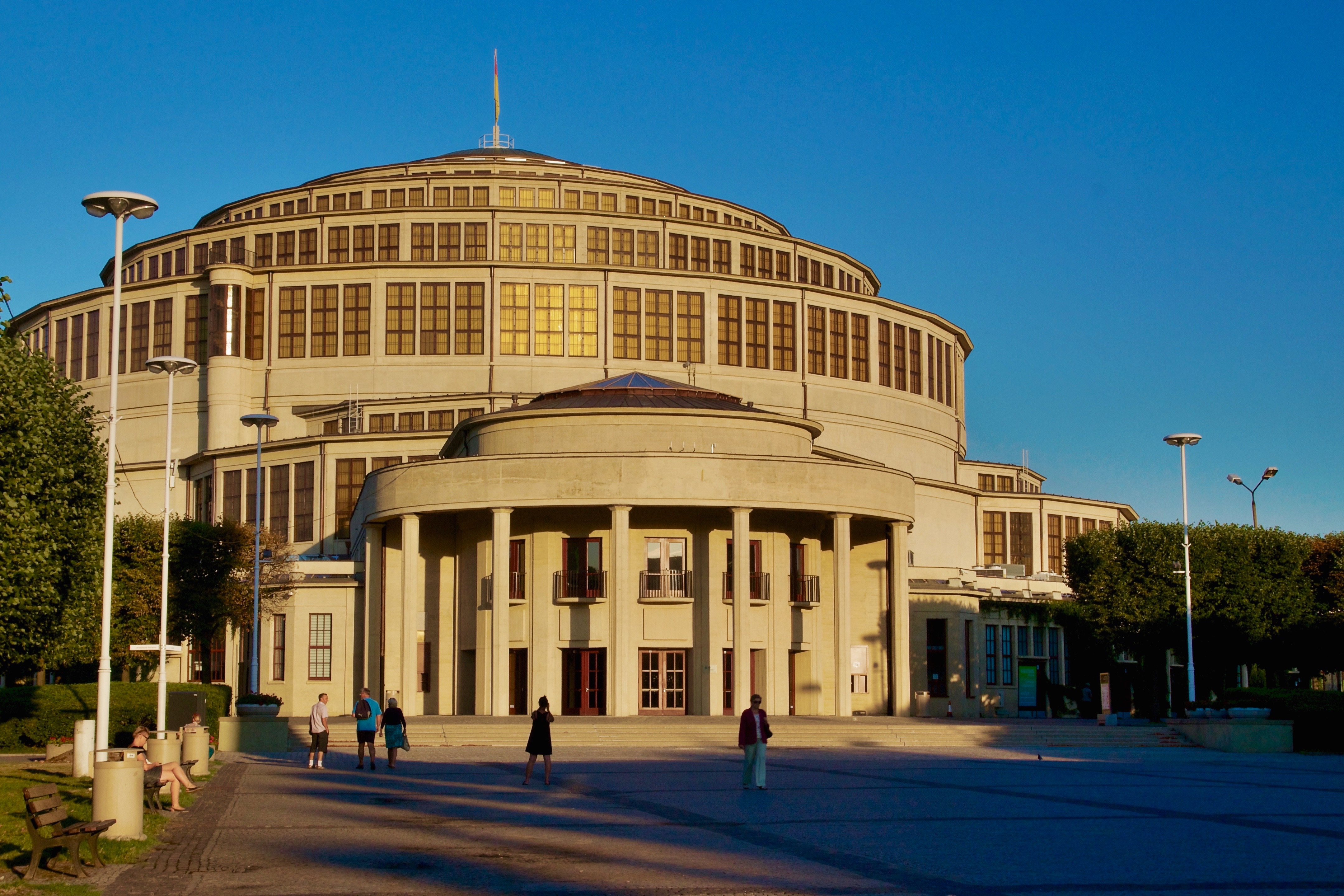 Hala ludowa